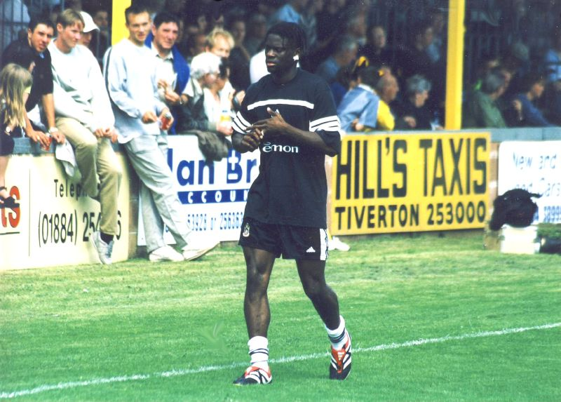 Louis Saha, just after signing for Fulham